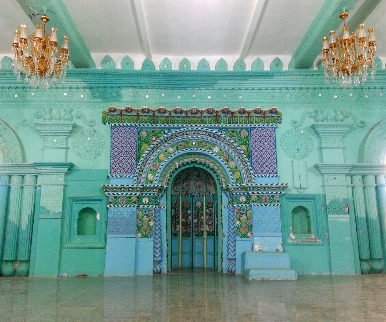 مسجد رانگونی‌های‌آبادان/ کلوپ هن